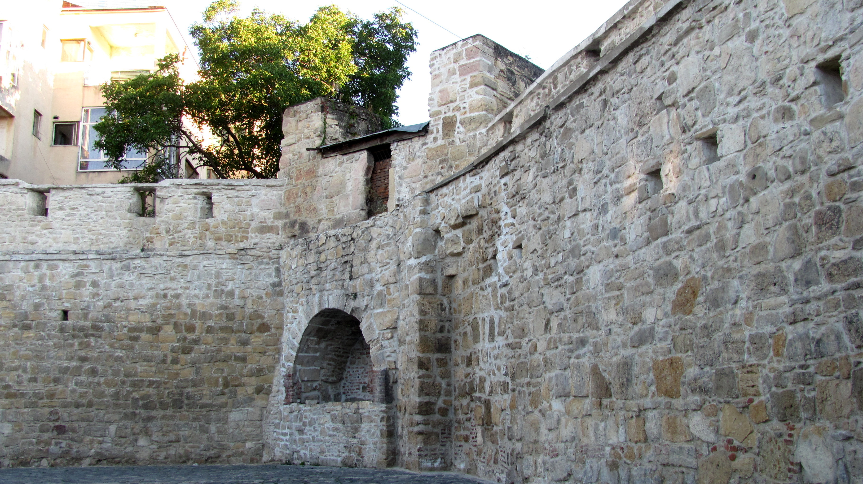 Cluj-Napoca-Str.Potaissa, nr.1-3 - Fragment din zidul celei de a doua incinte a orașului medieval 05